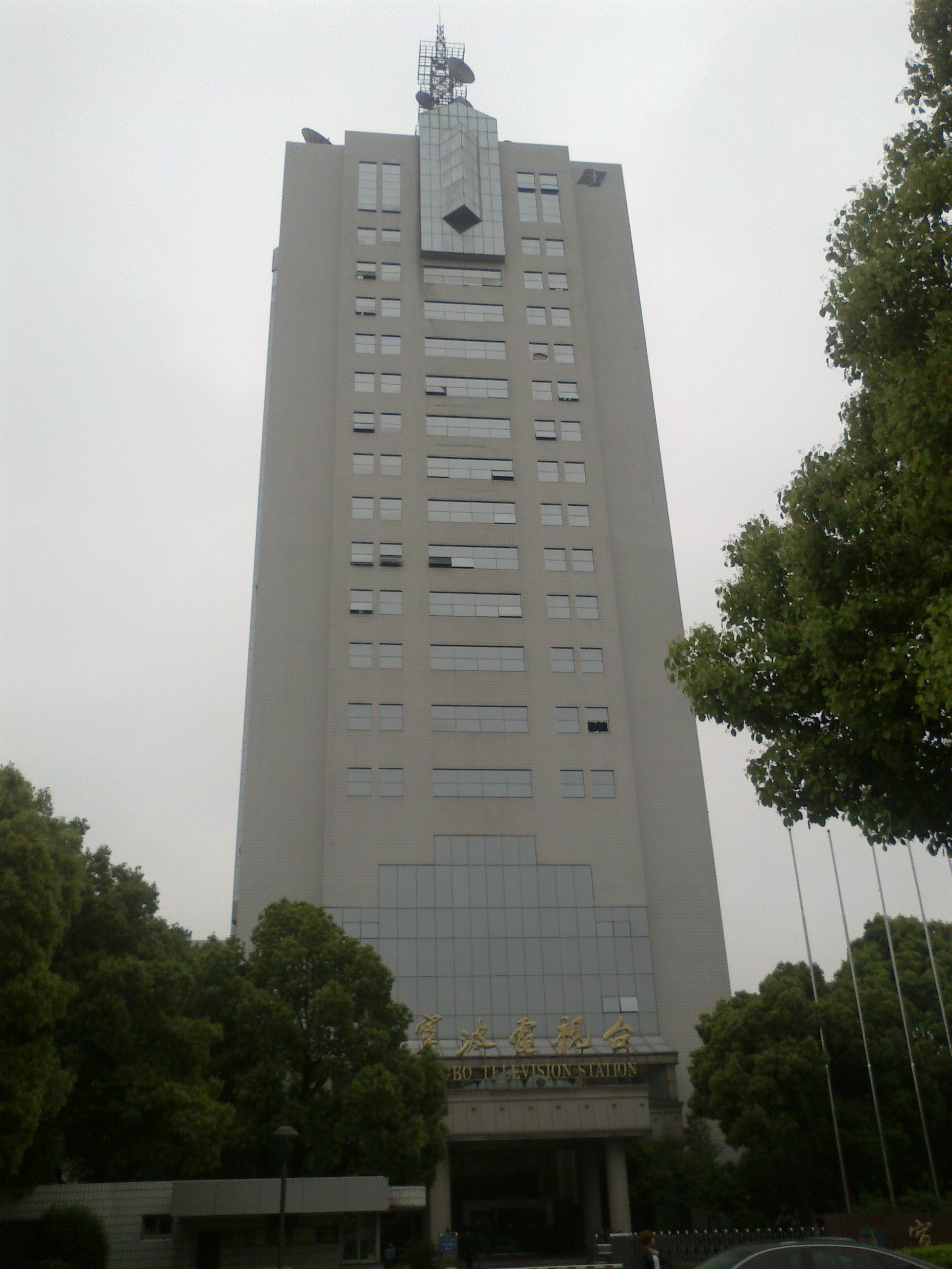 中文（中国大陆）: 宁波电视台